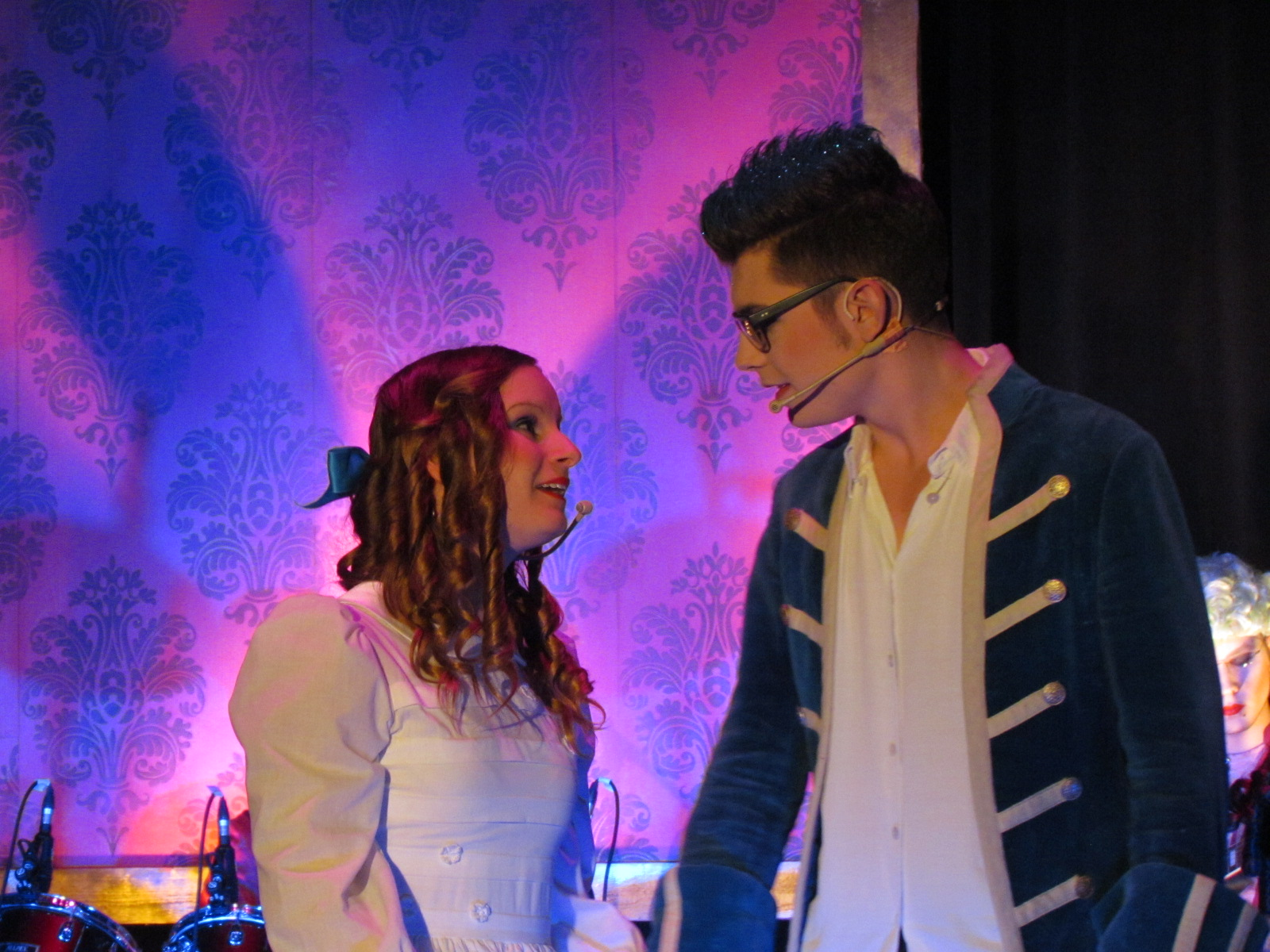 Madelon und Olivier beim Duett